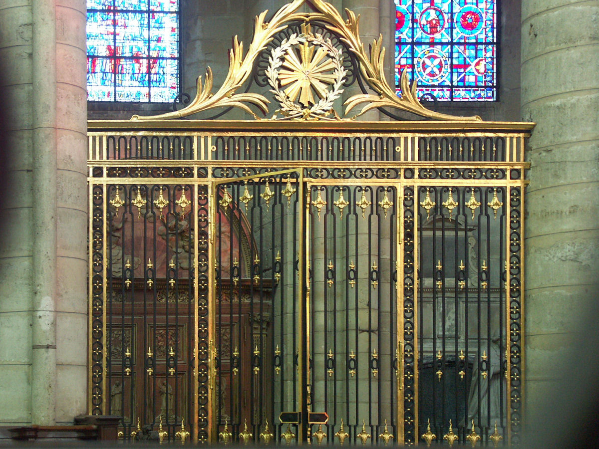 Cathédrale Saint-Gervais-et-Saint-Protais de Soissons, France